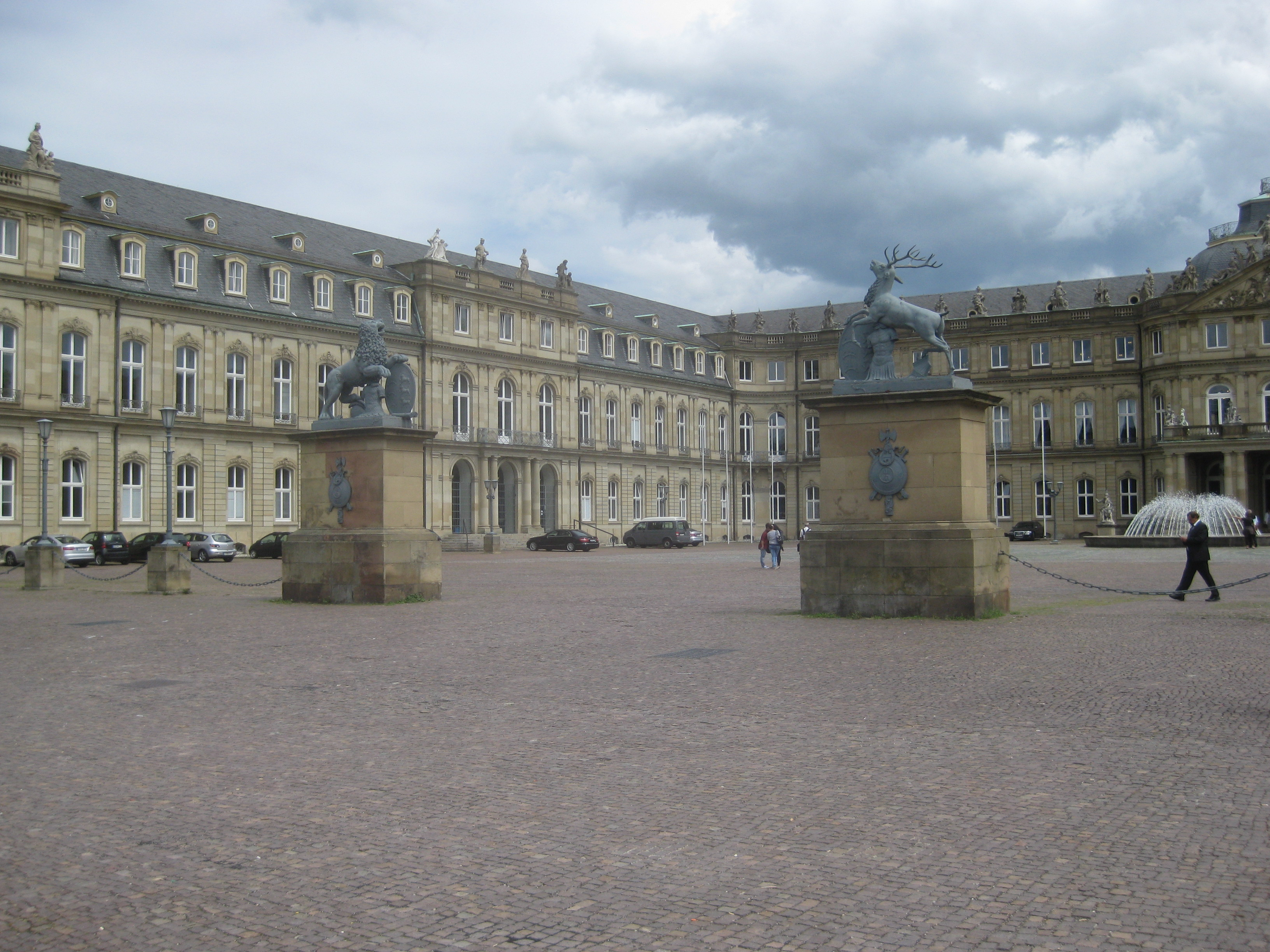 Neues Schloss Stuttgart, Blick vom Schlossplatz in den Ehrenhof mit dem linken Seitenflügel und dem Hauptflügel, vorn: Löwe und Hirsch, 2011.